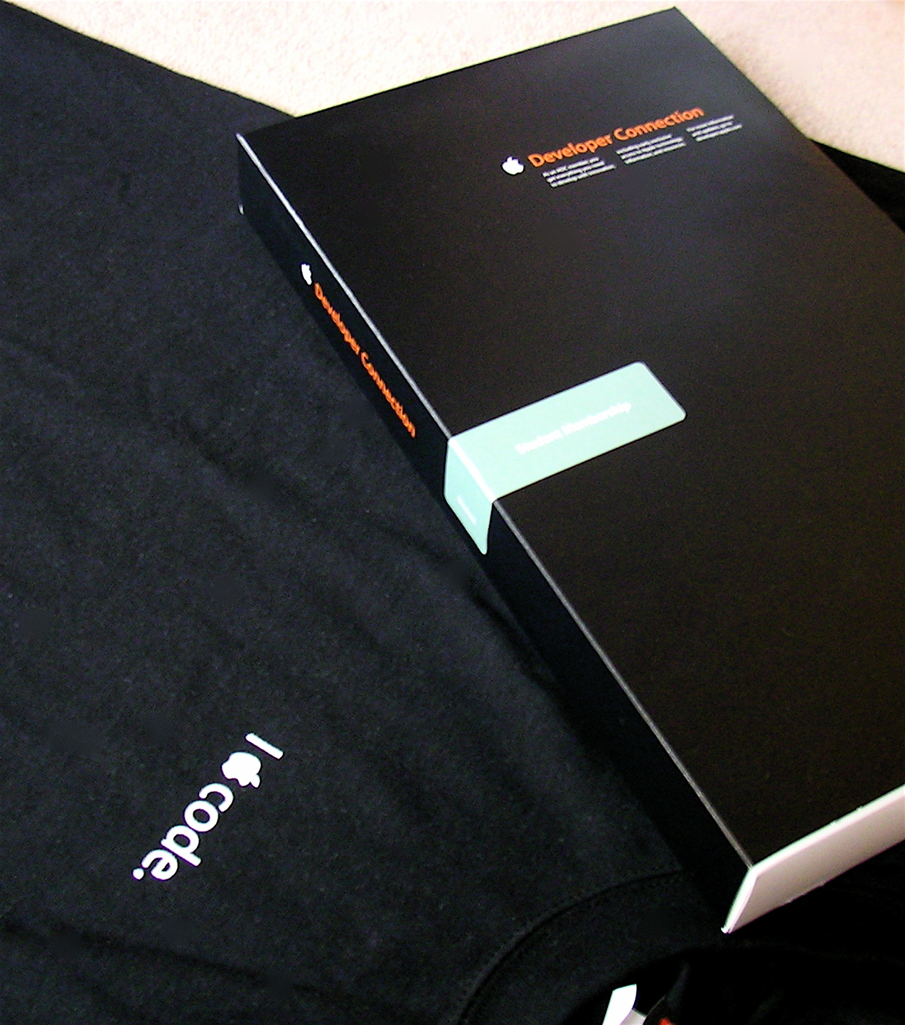 ADC Student Memebership Orientation Mailing